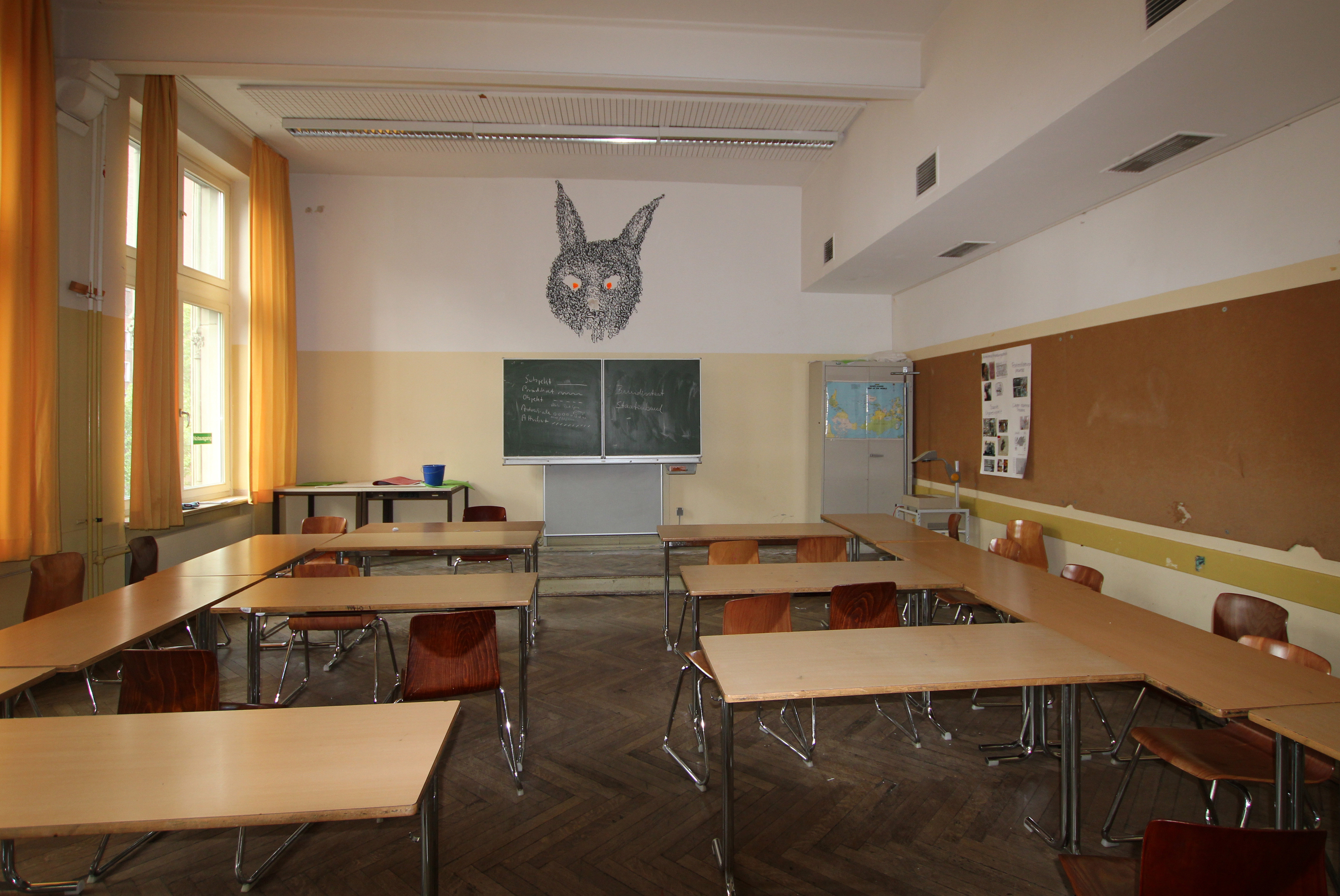 Köln-Neustadt-Nord, Hansagymnasium Hansaring 54-58 This is a photograph of an architectural monument.